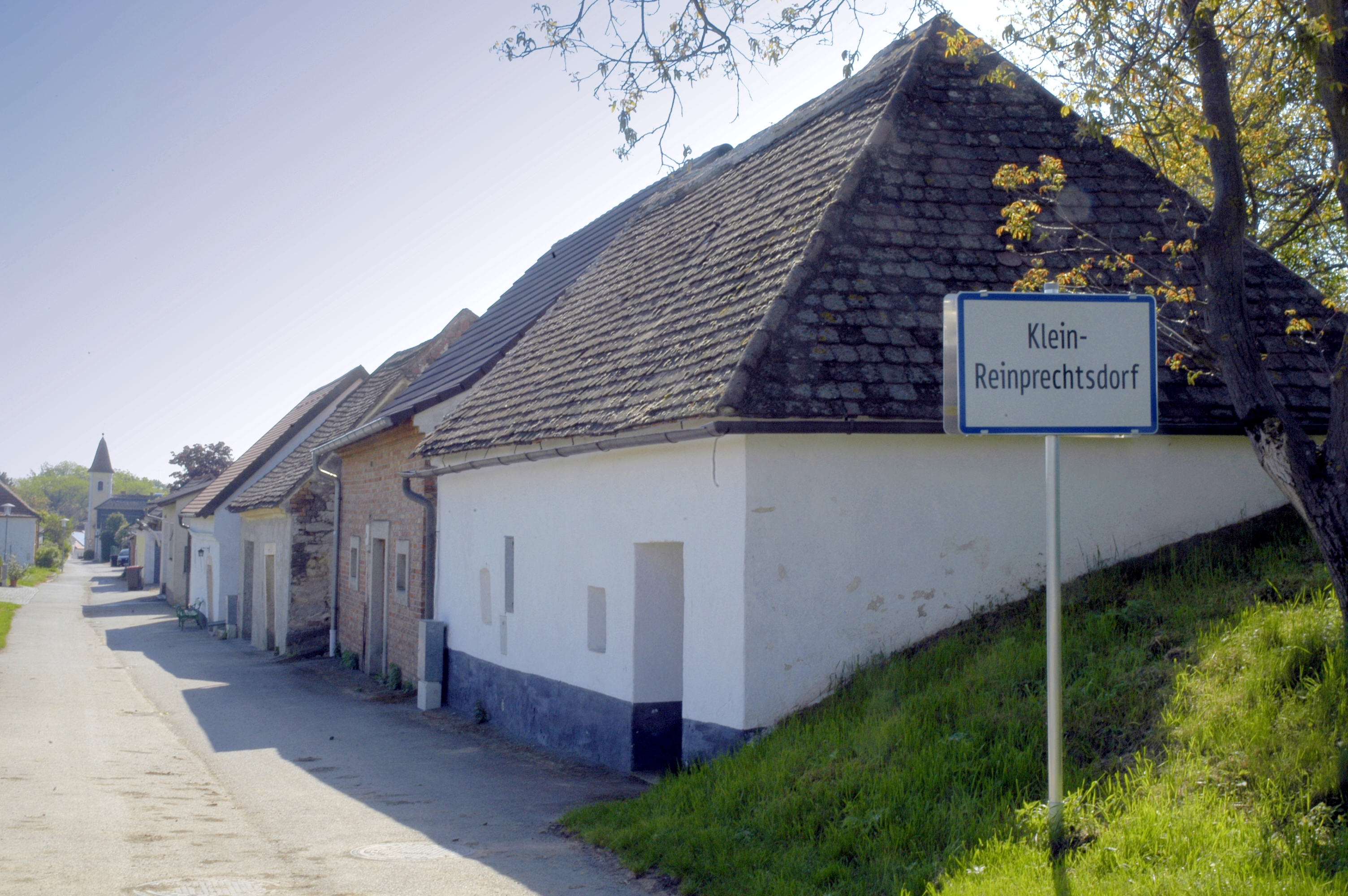 Kellergasse Klein Reinprechtsdorf, Gemeinde Röschitz